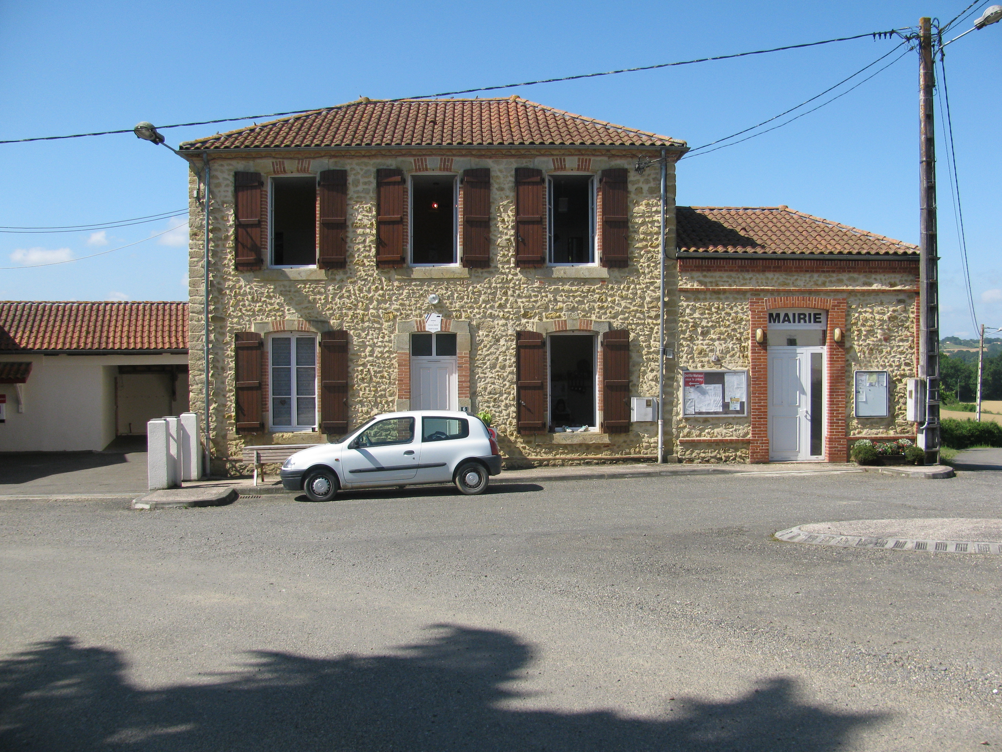 mairie à Aurensan